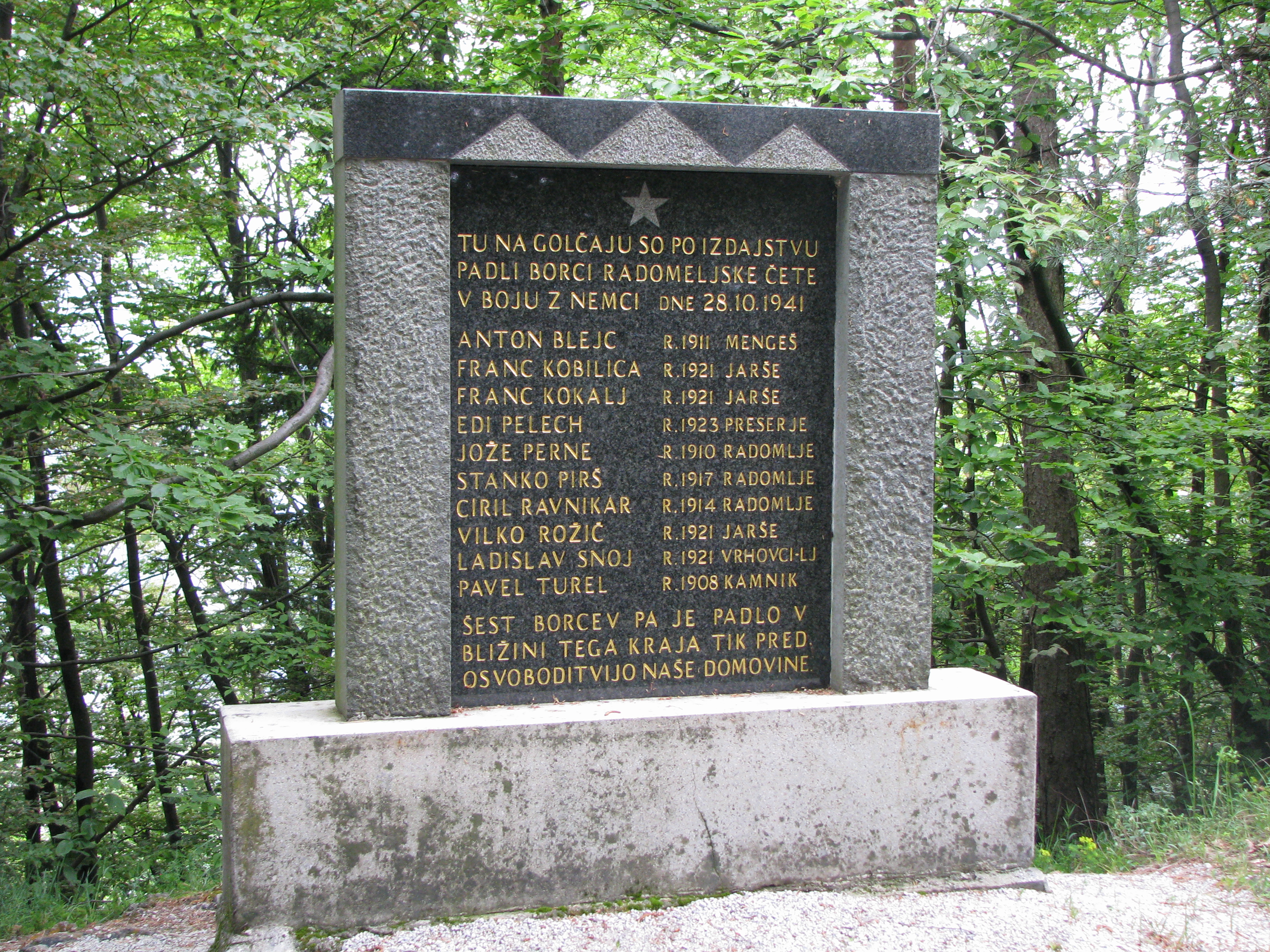 Spomenik padlim borcem Radomeljske čete na Golčaju